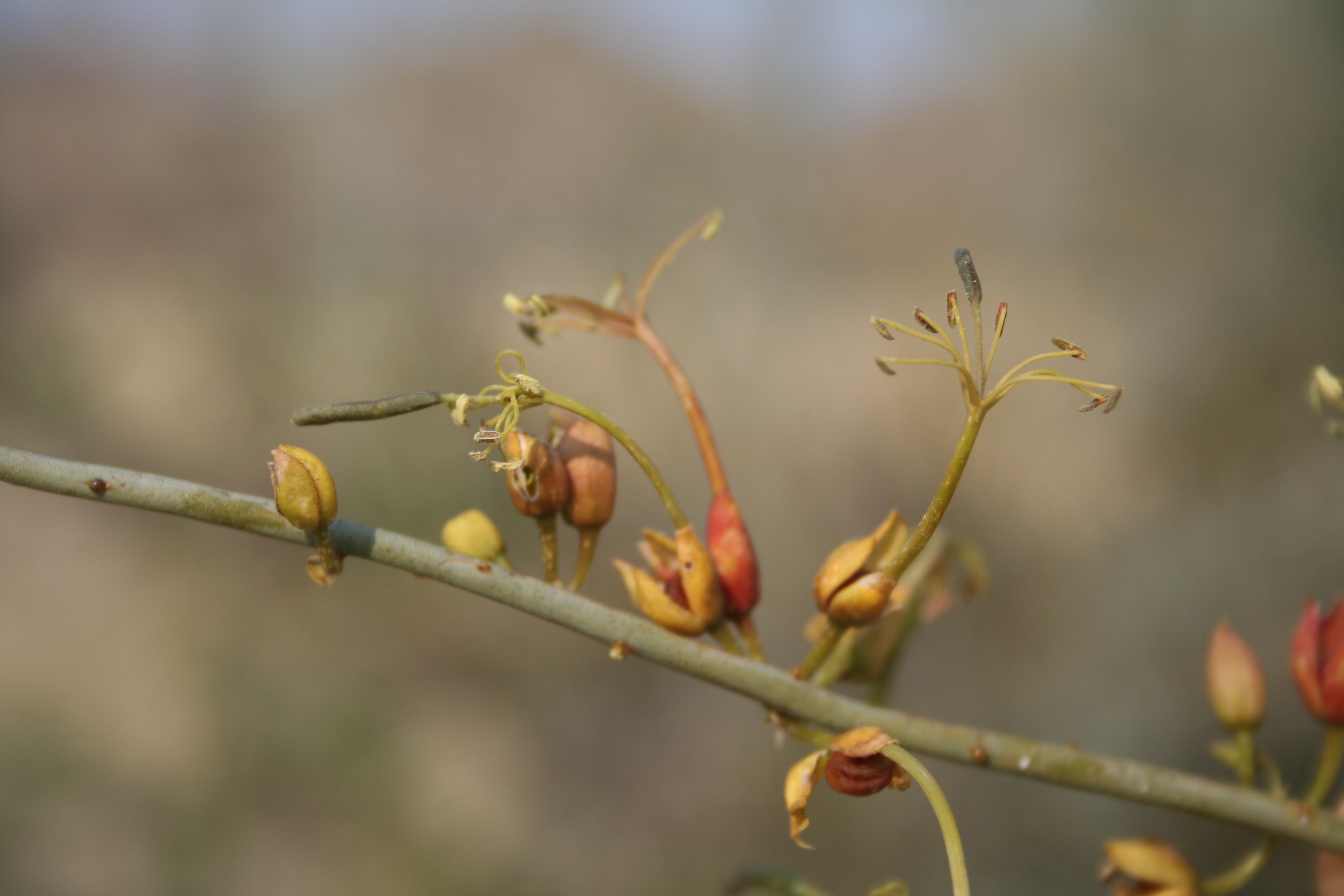 Cadaba aphylla, Namibia